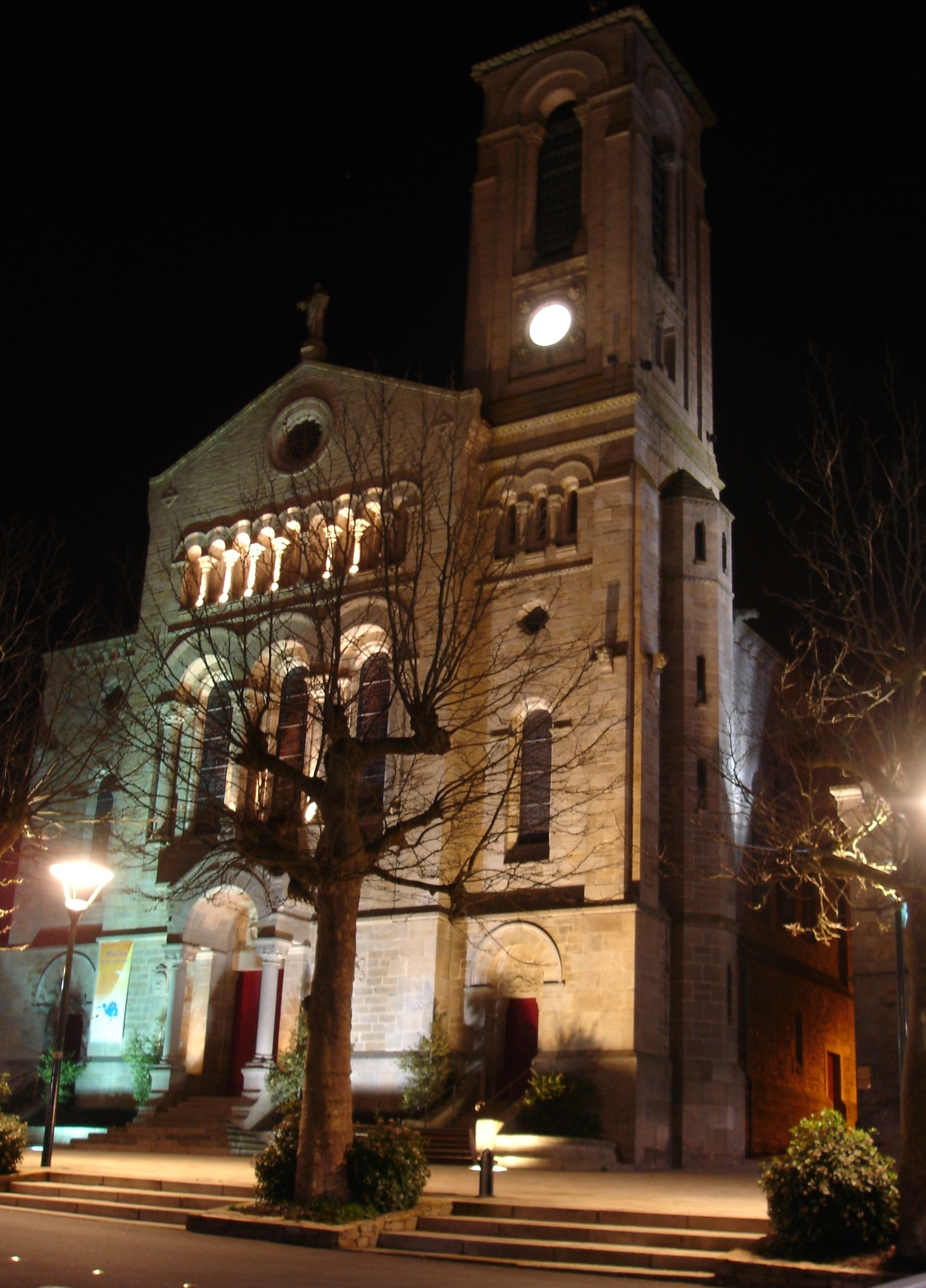 Église Sainte-Radegonde de la Bruffière, vue de nuit, janvier 2007